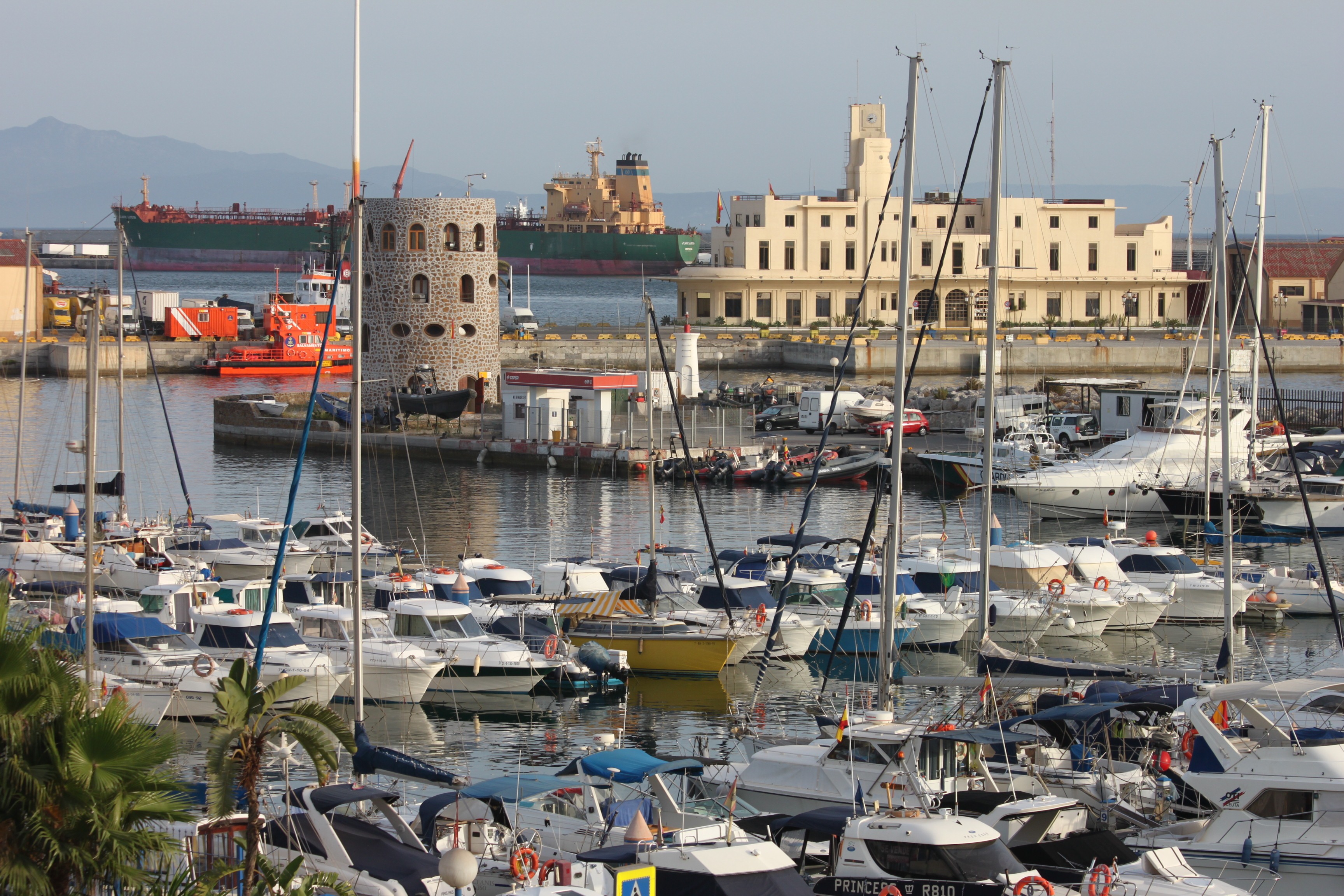 Club naútico de Ceuta, con el edificio de la Autoridad Portuaria al fondo